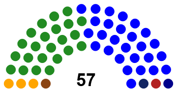 Composición de la Asamblea Legislativa 1998-2002